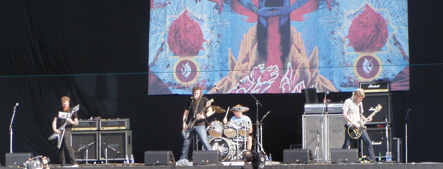 I Mastodon all'Heineken Jammin' Festival 2007